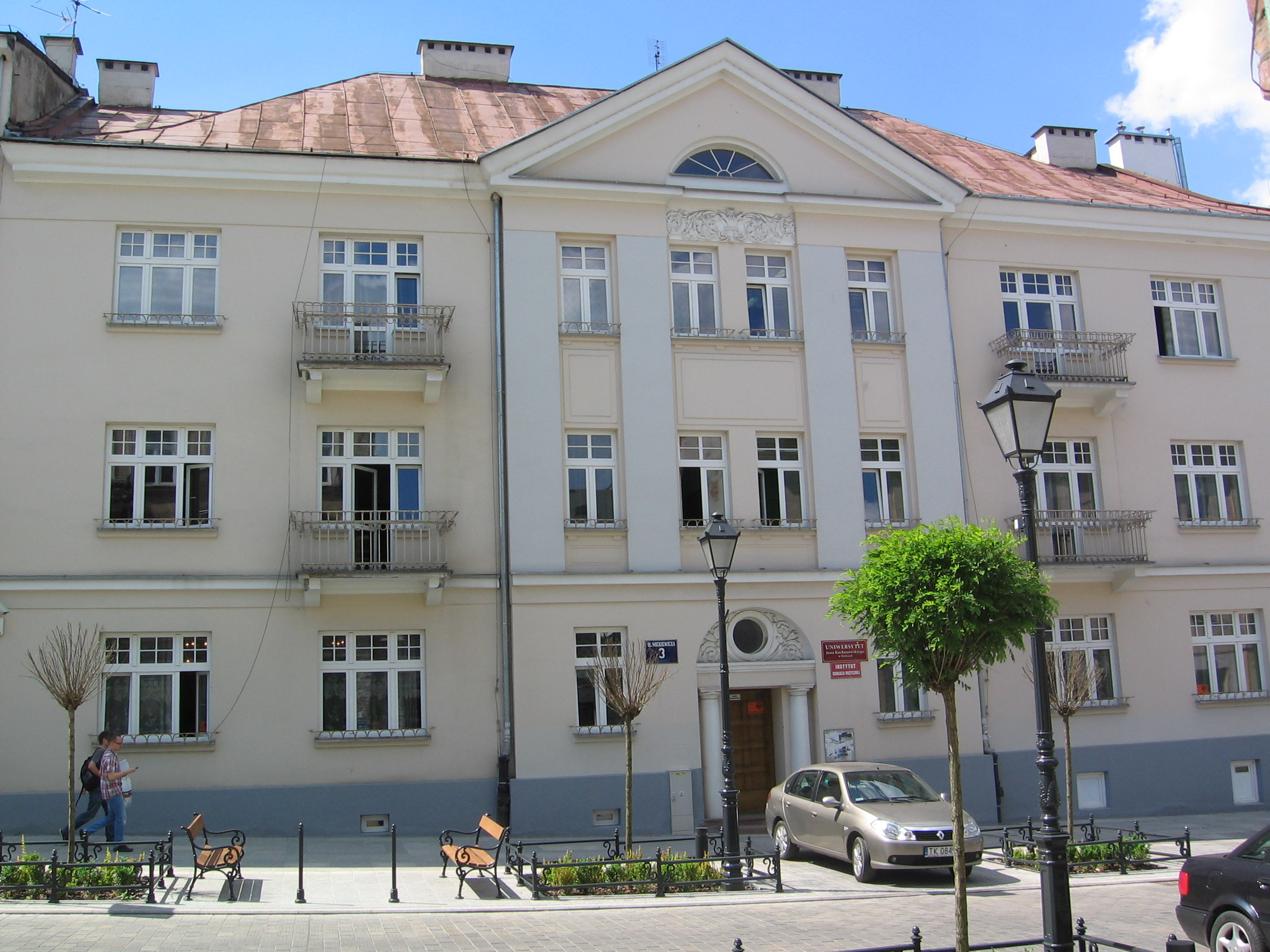 Siedziba Instytutu Edukacji Muzycznej UJK w Kielcach przy ul. Mickiewicza 3.